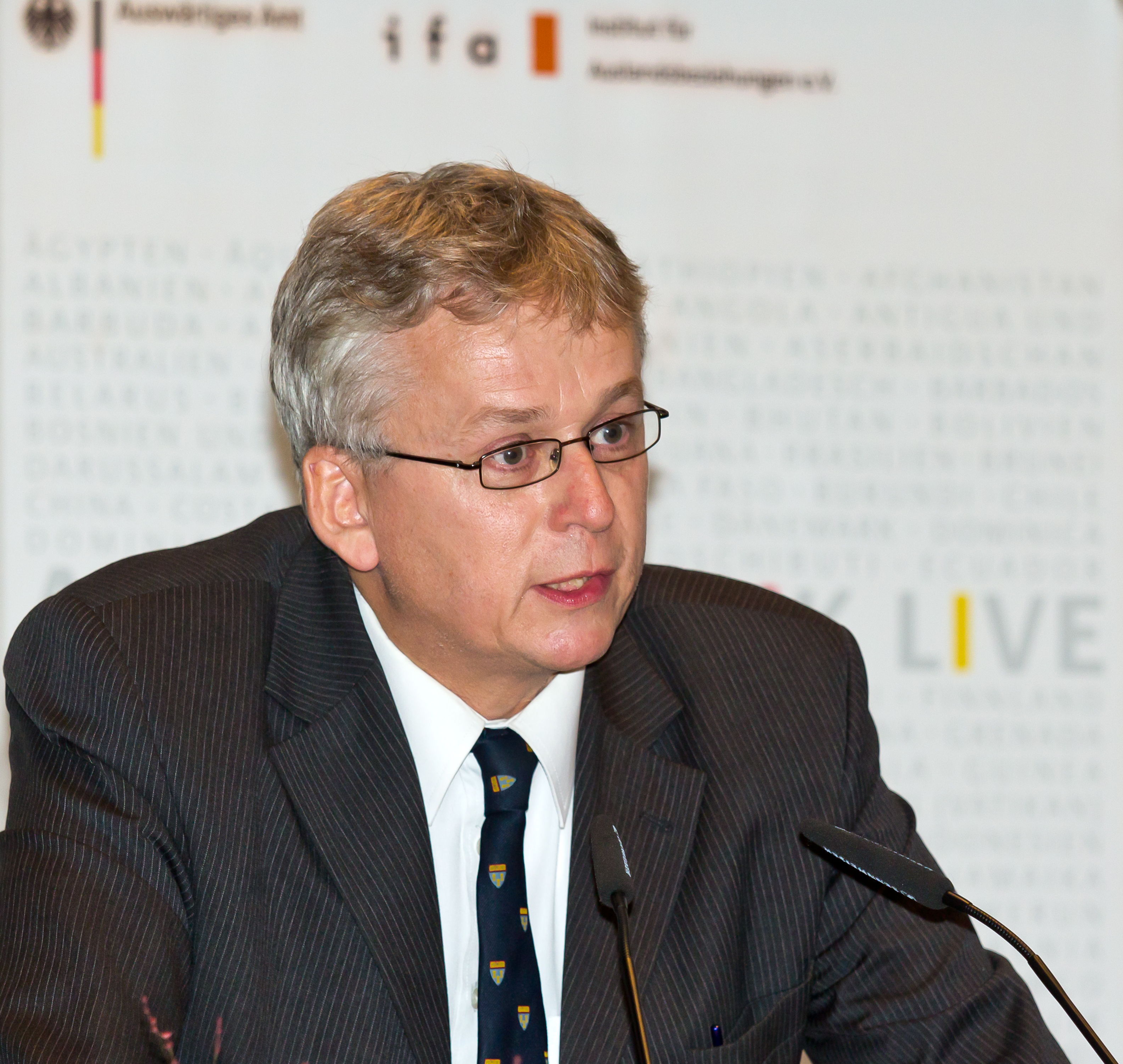 Diskussionsveranstaltung „Deutschlands Rolle in den Vereinten Nationen - eine Bilanz“ im Kölner Rathaus Foto: Prof. Dr. Andreas Zimmermann, Lehrstuhlinhaber der Professur für öffentliches Recht an der Universität Potsdam